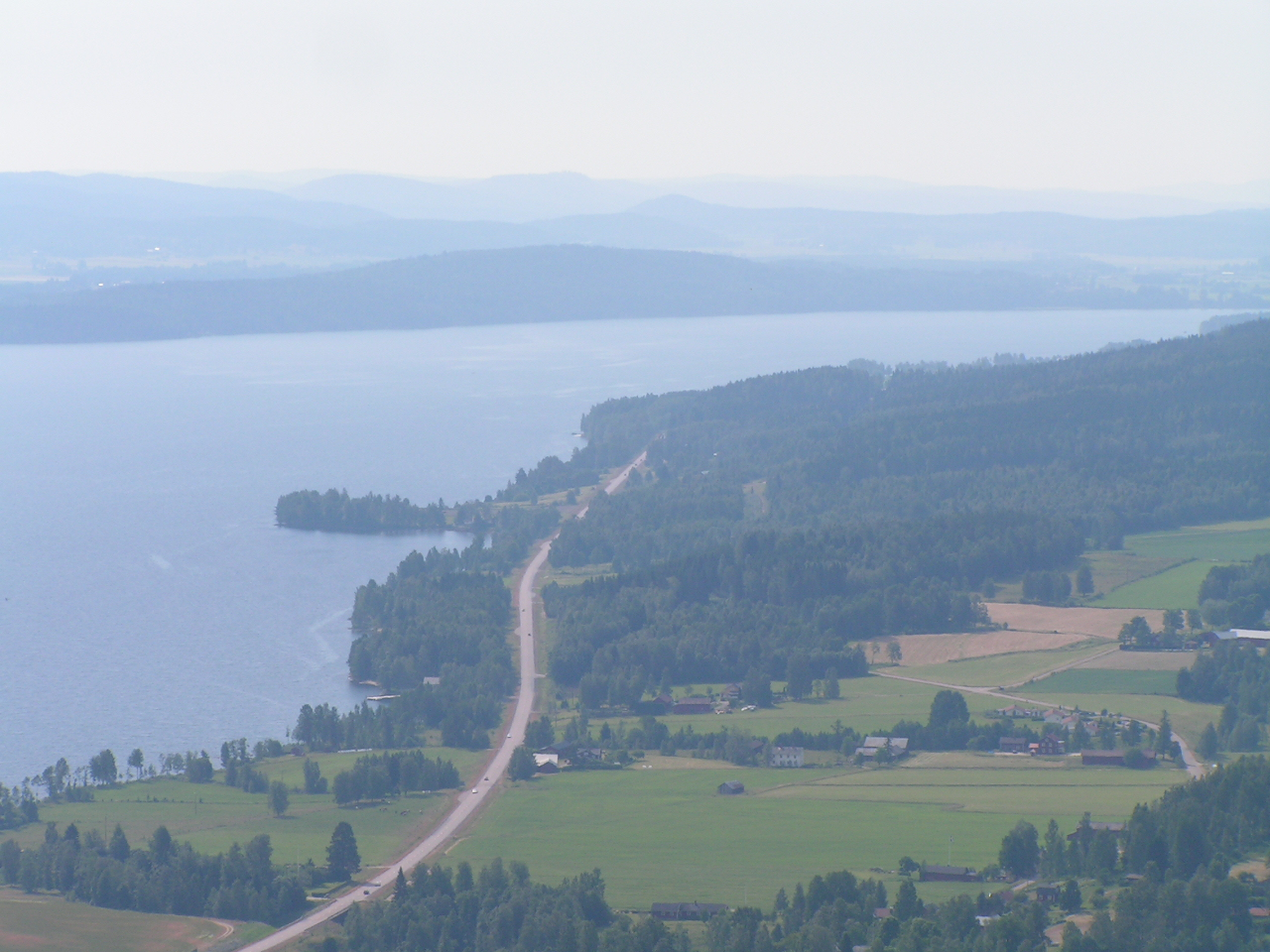 Vy söderut från Tossebergsklätten